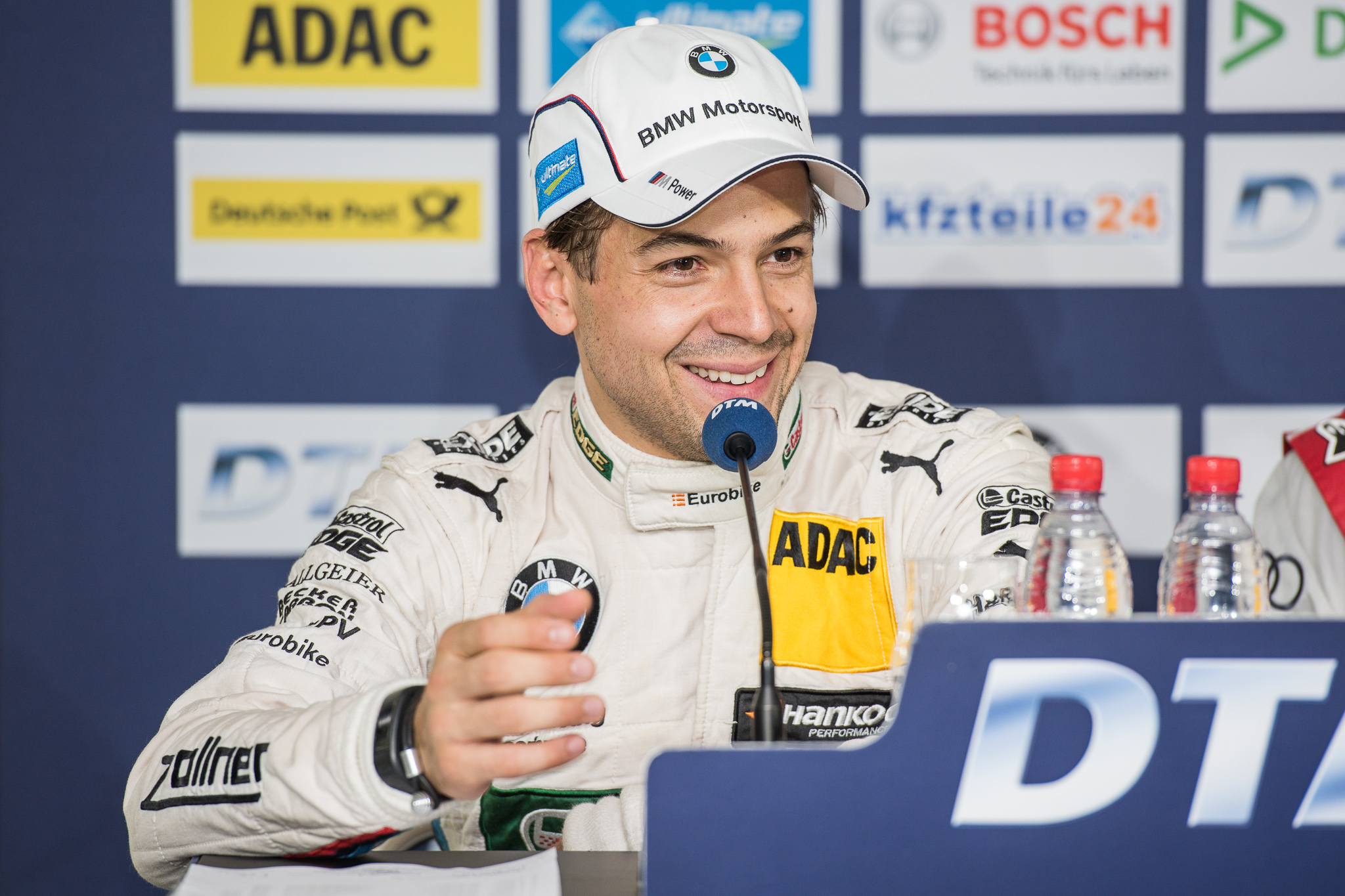 Augusto Farfus,DTM,Deutsche Tourenwagen Masters,Hockenheimring,Motorsport,Pressekonferenz,RBM,Racing Bart Mampaey